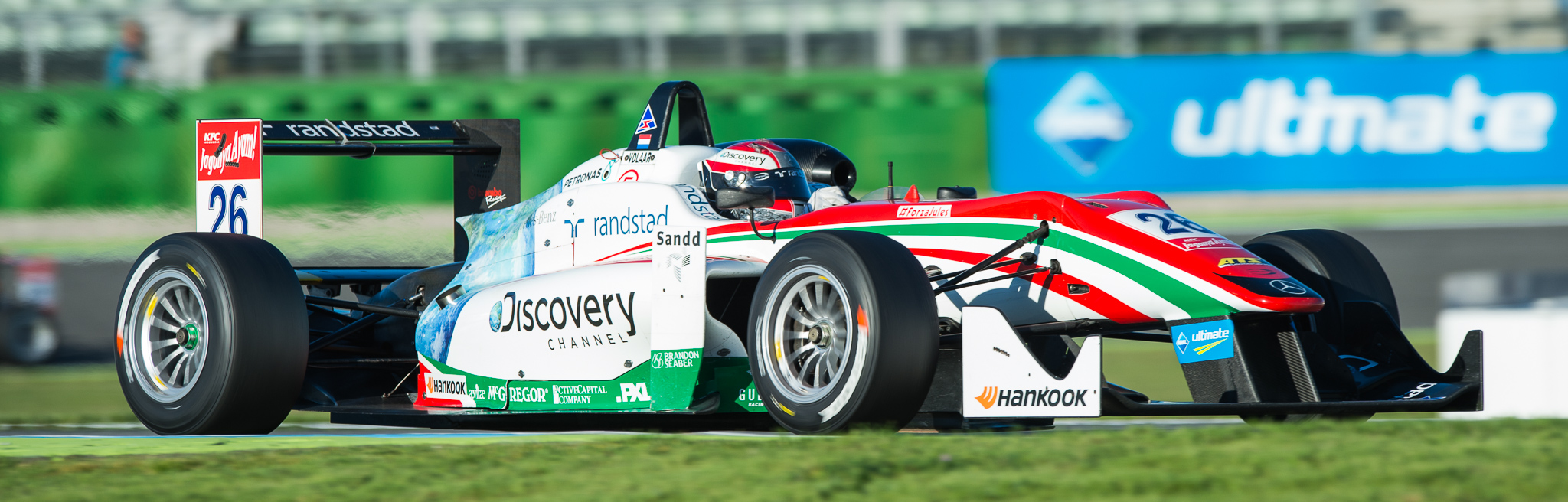 DTM,Dallara F312,Dennis van de Laar,Deutsche Tourenwagen Masters,F3 FIA European Championship,FIA Formel 3 Europameisterschaft,Hockenheimring,Mercedes-Benz,Motorsport,Prema Powerteam